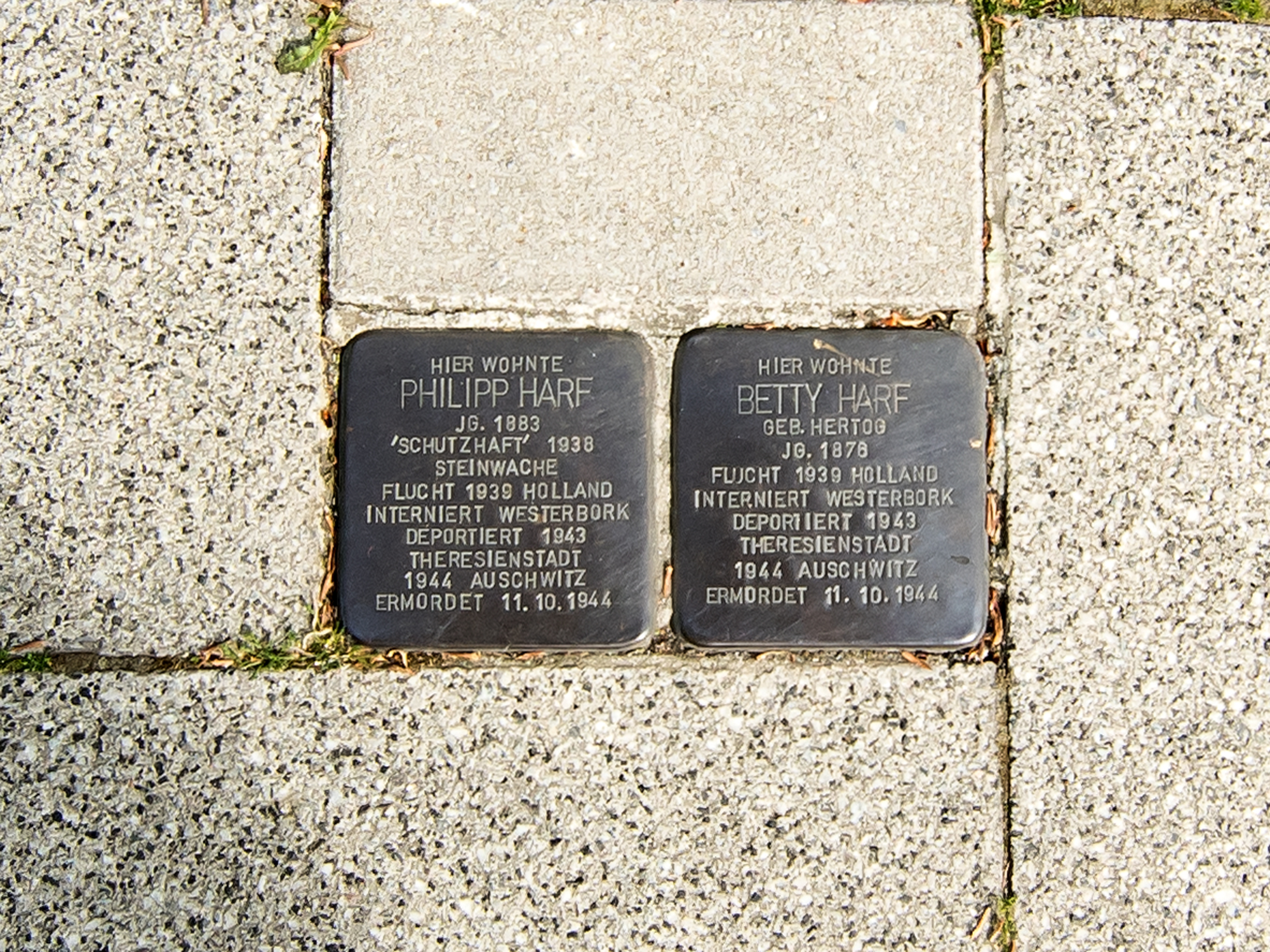 Stolpersteine von Betty und Philipp Harf in Dortmund